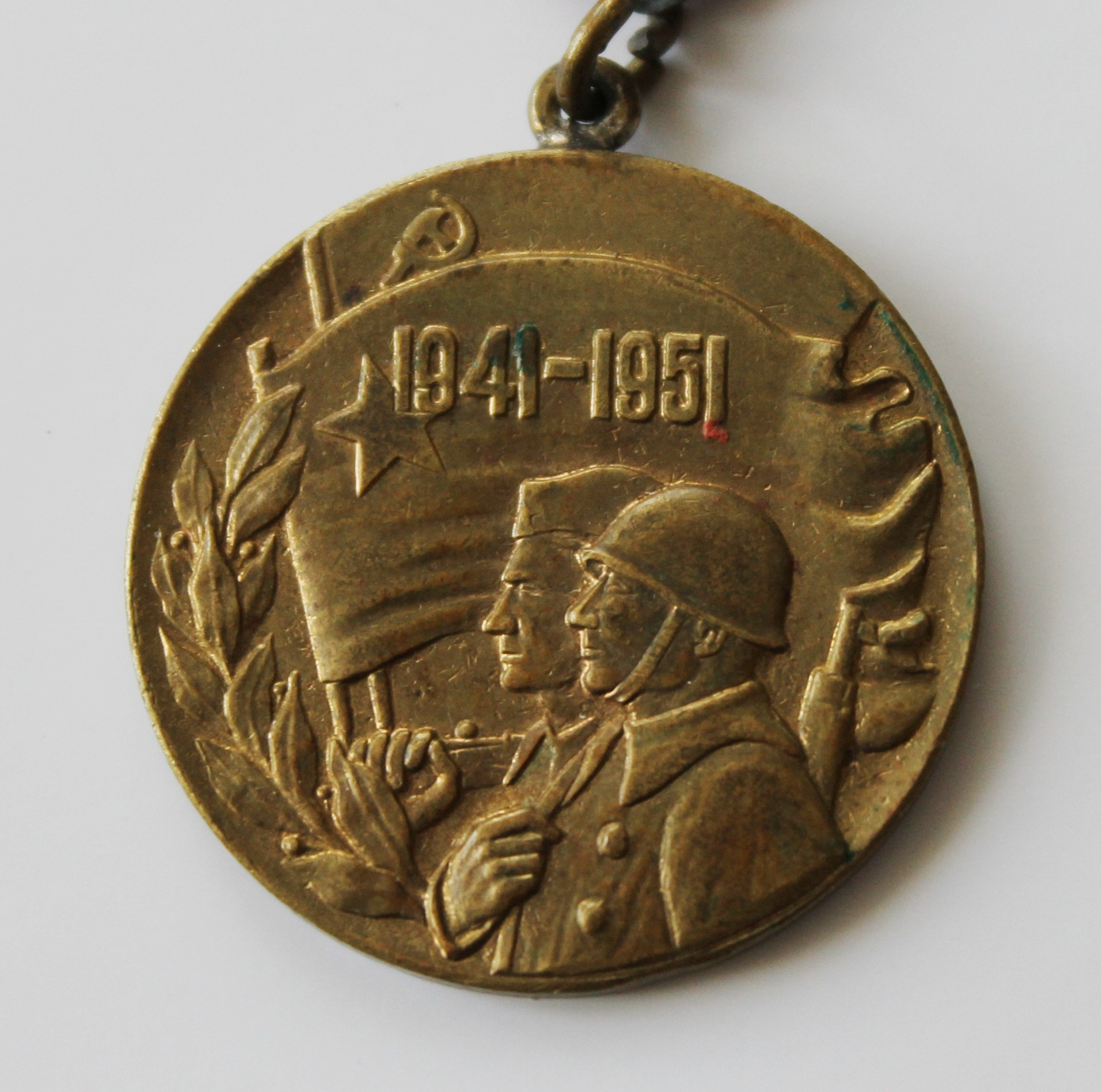 Спомен-медаља поводом десетогодишњице ЈНА, 1951. година (предња страна)